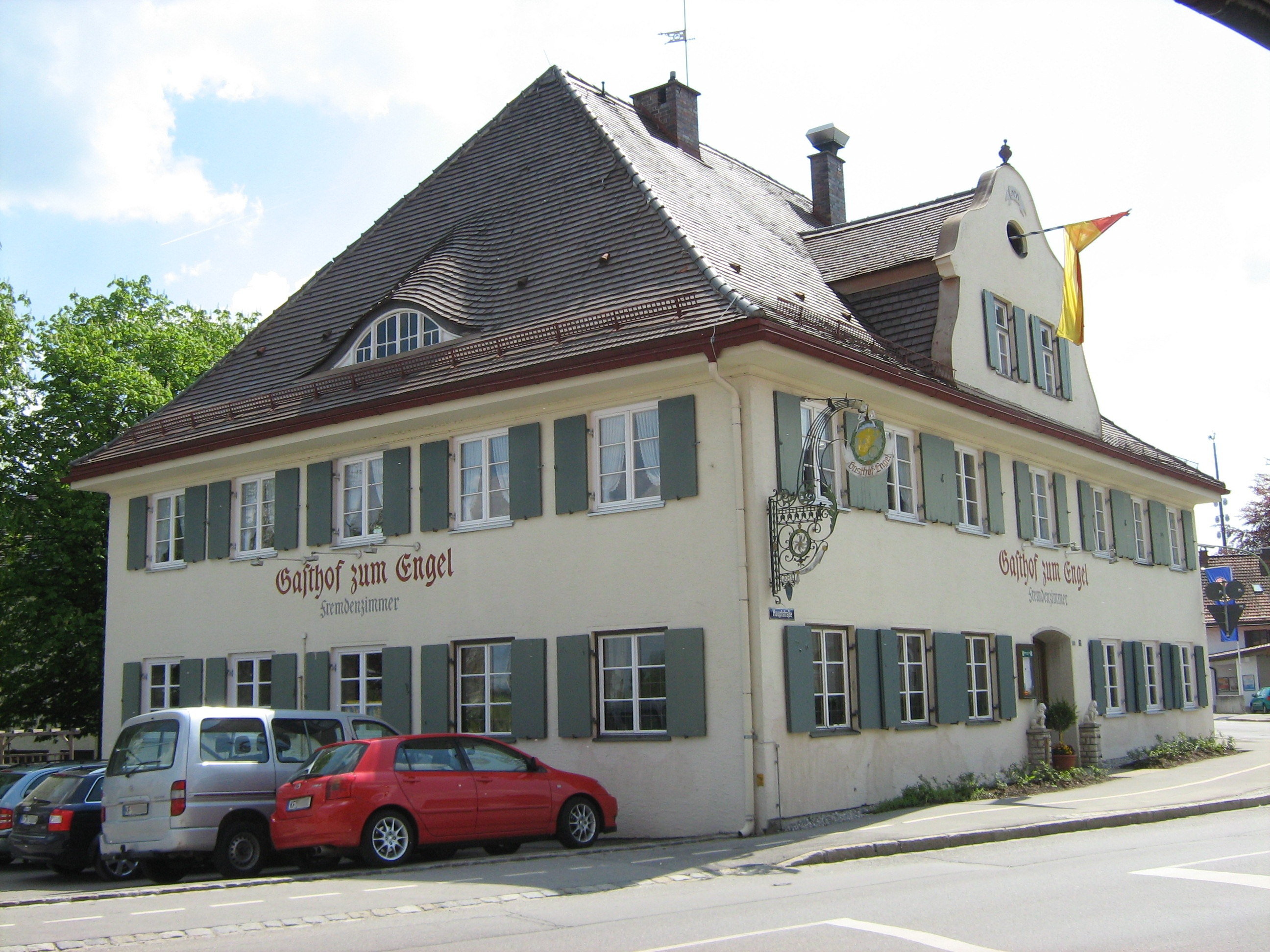 Oberbeuren Gasthof Engel von NordWesten